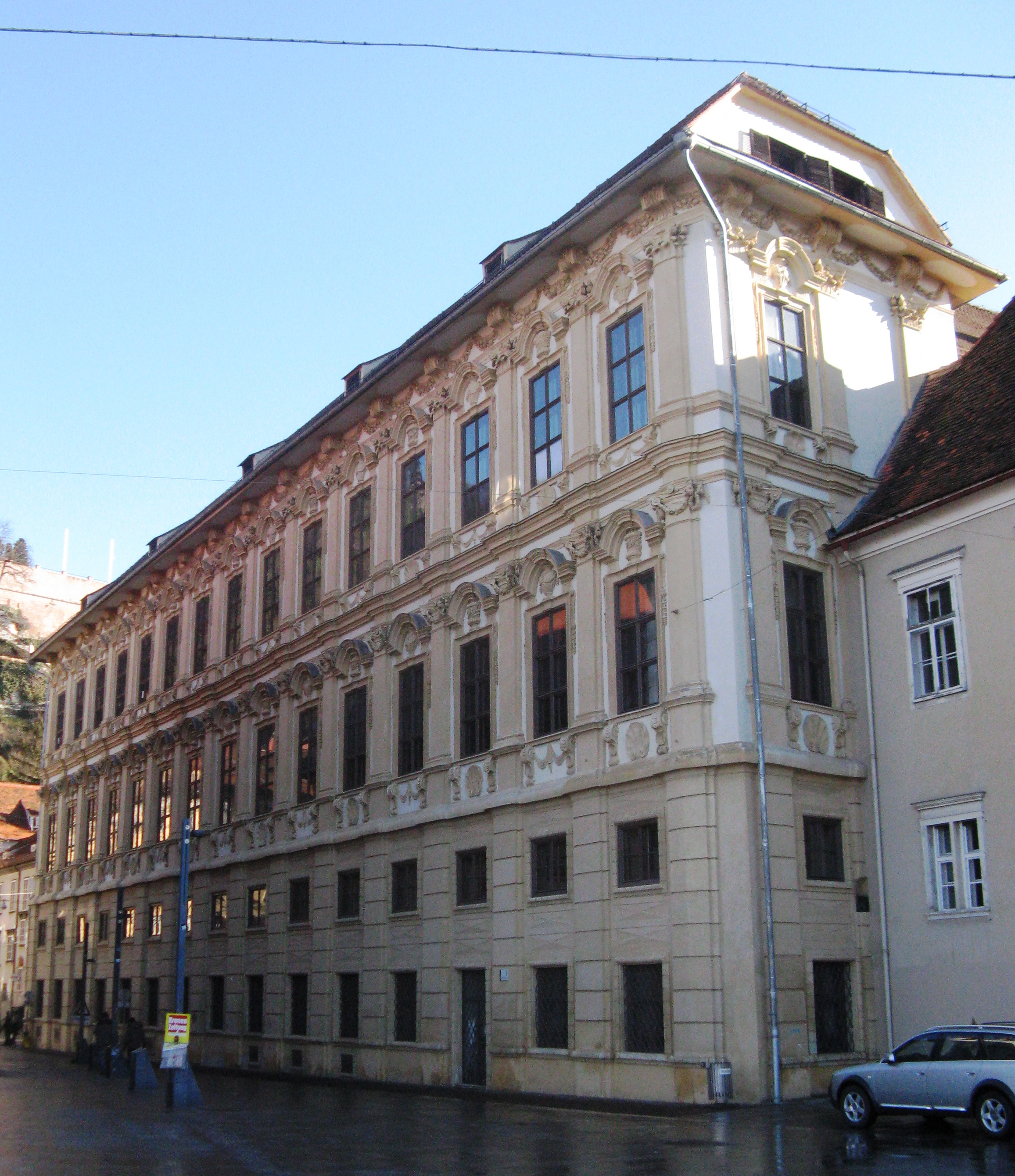 Nordfassade der Palais Attems, Sackstraße, Innere Stadt, Graz